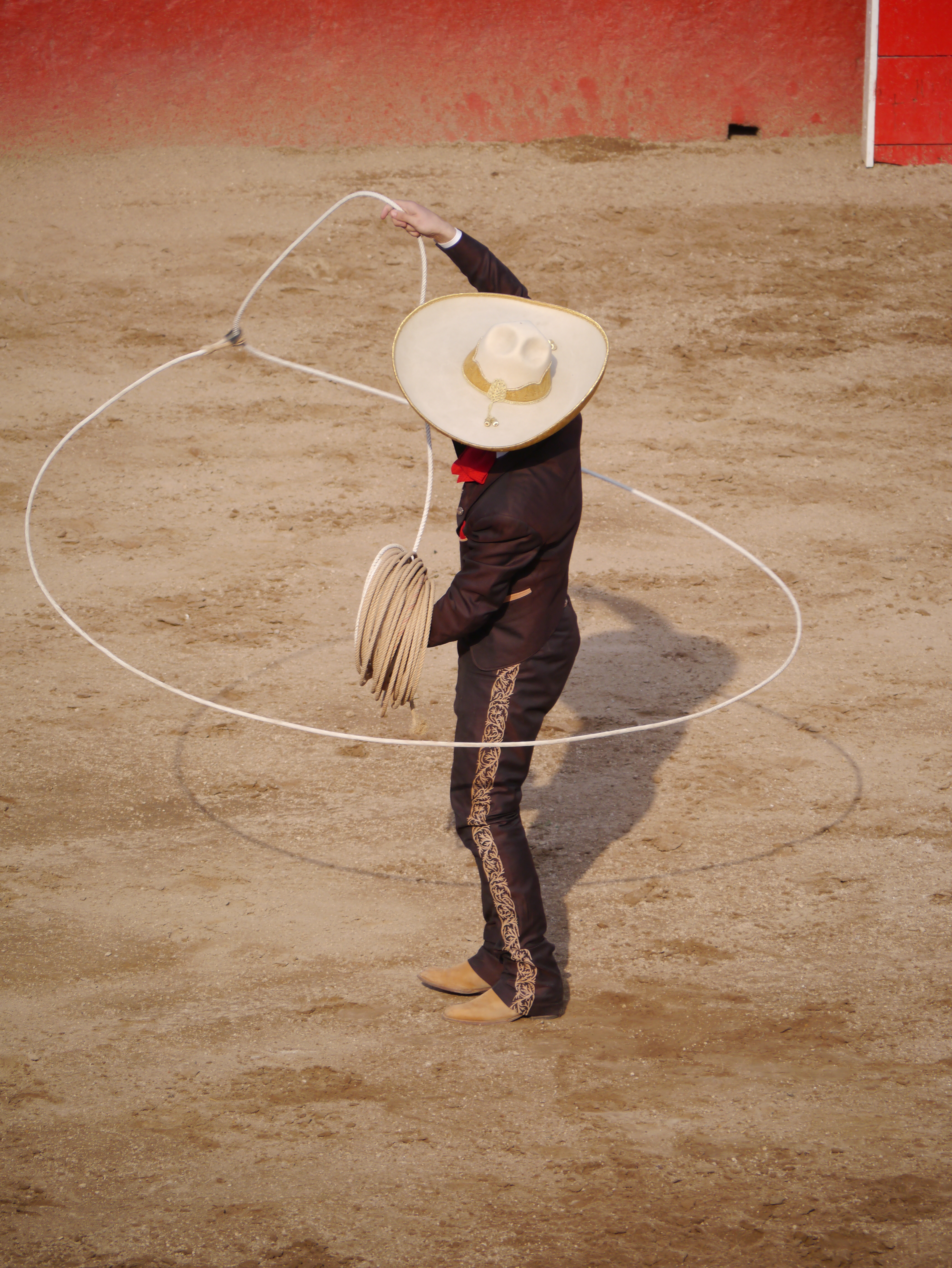 flóreame...